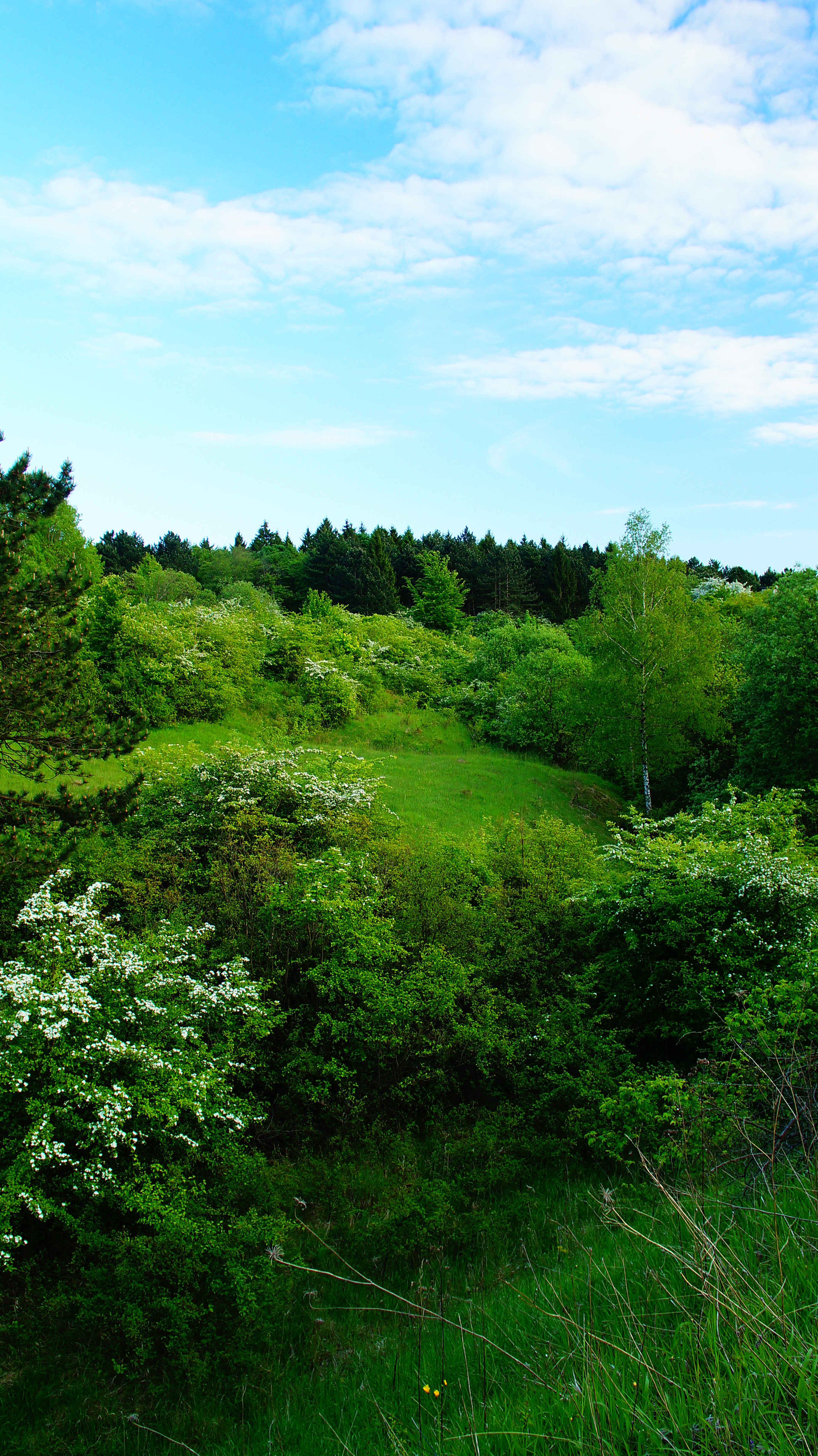 Blick vom Nordhang in den bewachsenen ehemaligen Steinbruch. Naturschutzgebiet Kalksteinbruch und Halbtrockenrasen am Eich-Berg bei Hemkenrode, NSG BR 050, im Landkreis Wolfenbüttel (Niedersachsen, Deutschland).